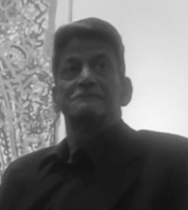 लेखक किरण नगरकर यांचे मेलबर्न येथील कार्यक्रमात घेतलेले छायाचित्र